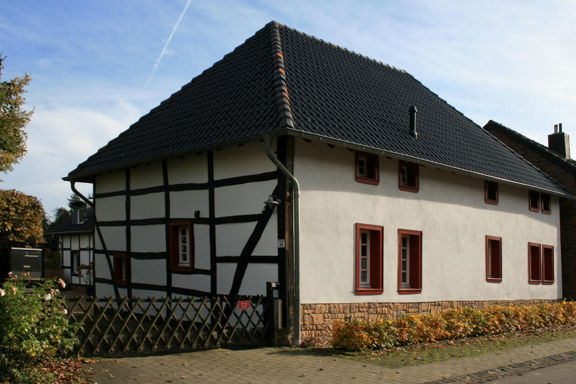 Das Fachwerkhaus in Nörvenich-Eggersheim, Kurfürstenstr. 13